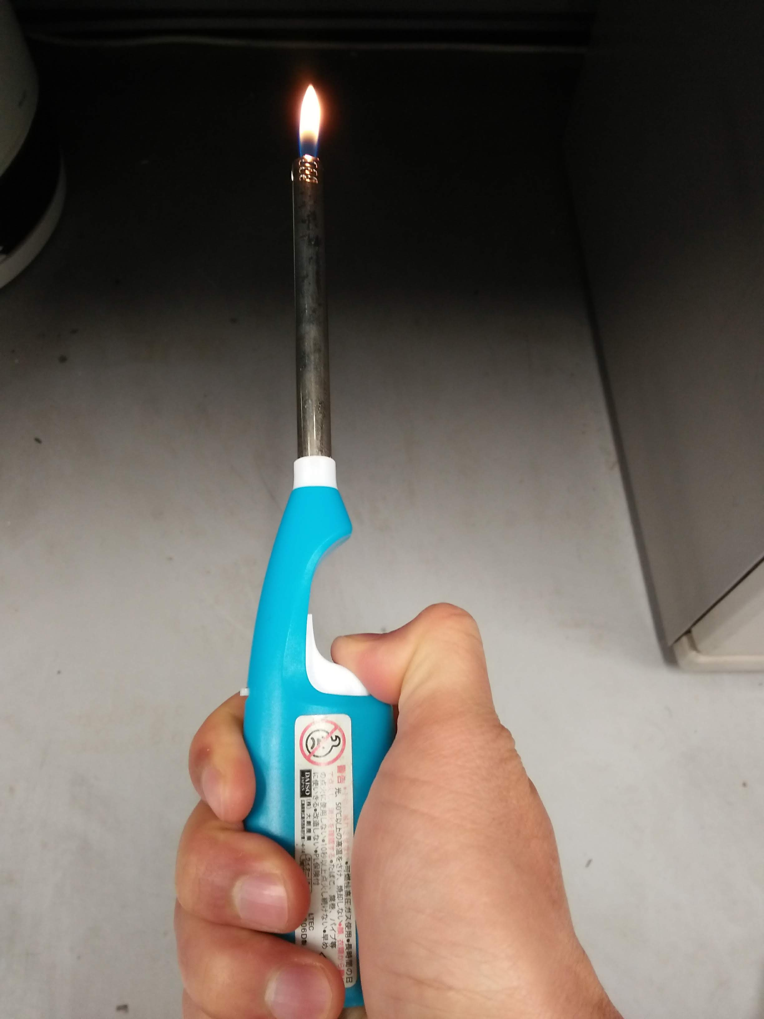 korek api gas batang